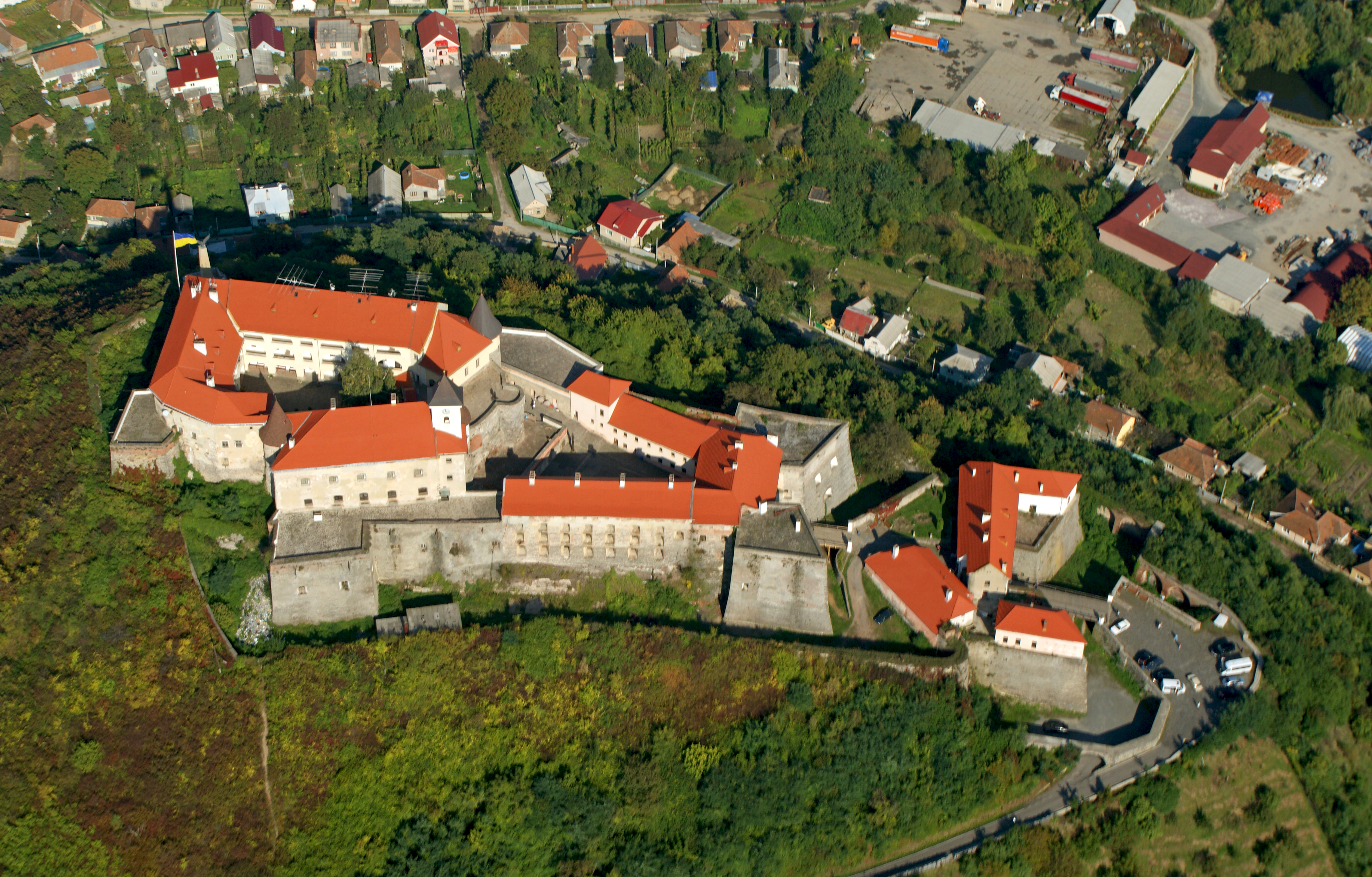 Замок "Паланок" (мур.), Мукачеве, Замкова гора